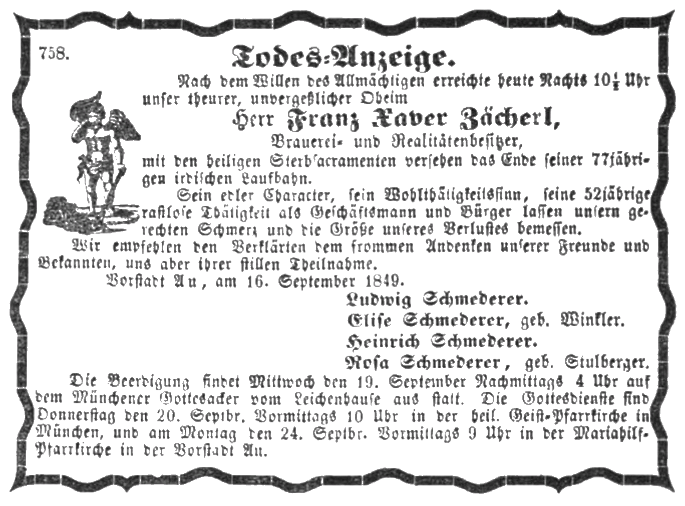 Franz Xaver Zacherl (legal name: Zächerl; 1772–1849), German brewer and politician